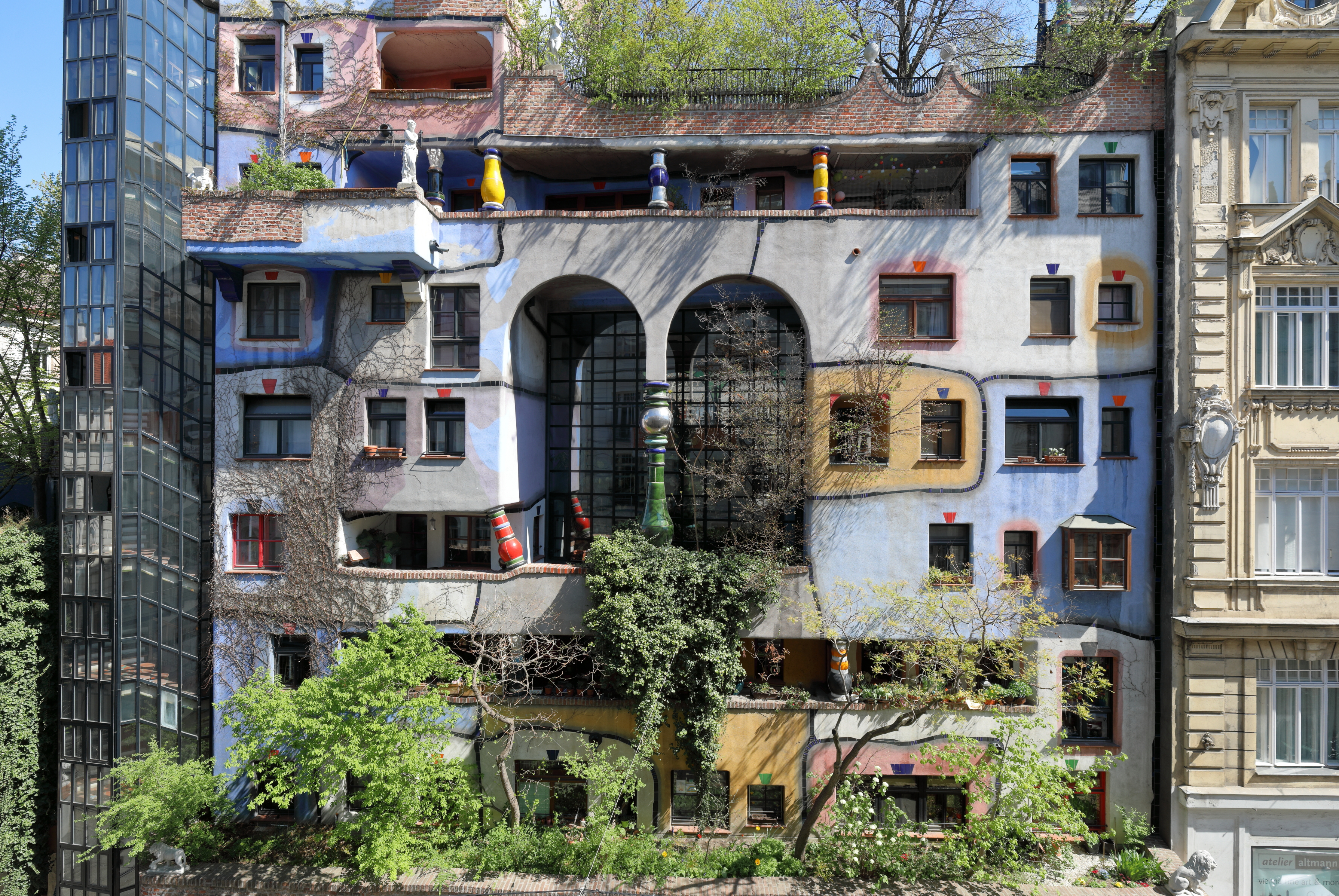 Die Fassade des Hundertwasserhauses in der Löwengasse im 3. Wiener Gemeindebezirk Landstraße.Die Wohnhausanlage der Gemeinde Wien mit 50 Wohneinheiten wurde als Ökohaus an der Ecke Kegelgasse/Löwengasse von 1983 bis 1985 errichtet. Entworfen wurde sie von dem Künstler Friedensreich Hundertwasser, anfangs in Zusammenarbeit mit dem Architekten Josef Krawina. Nach dem Zerwürfnis Hundertwasser mit dem Architekten Krawina, wurde die Wohnhausanlage mit dem Architekten Peter Pelikan fertiggestellt.